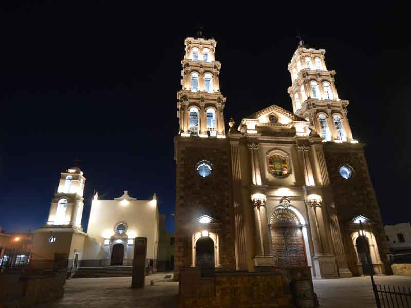 Catedral junto a Mision de Guadalupe